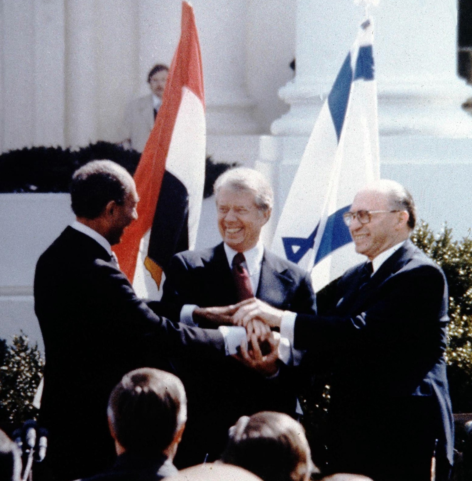 THE TRIPLE HANDSHAKE IN THE PEACE TREATY SIGNING BETWEEN ISRAEL AND EGYPT ON THE WHITE HOUSE LAWN. R. TO L: P.M. MENAHEM BEGIN, PRES. JIMMY CARTER AND A. SADAT. . לחיצת יד משולשת בבית הלבן, בטקס חתימת חוזה השלום בון ישראל למצרים בוושינגטון. בצילום מימין לשמאל - ראש הממשלה מנחם בגין, נשיא ארהב ג'ימי קארטר ונשיא מצרים אנואר סאדת.